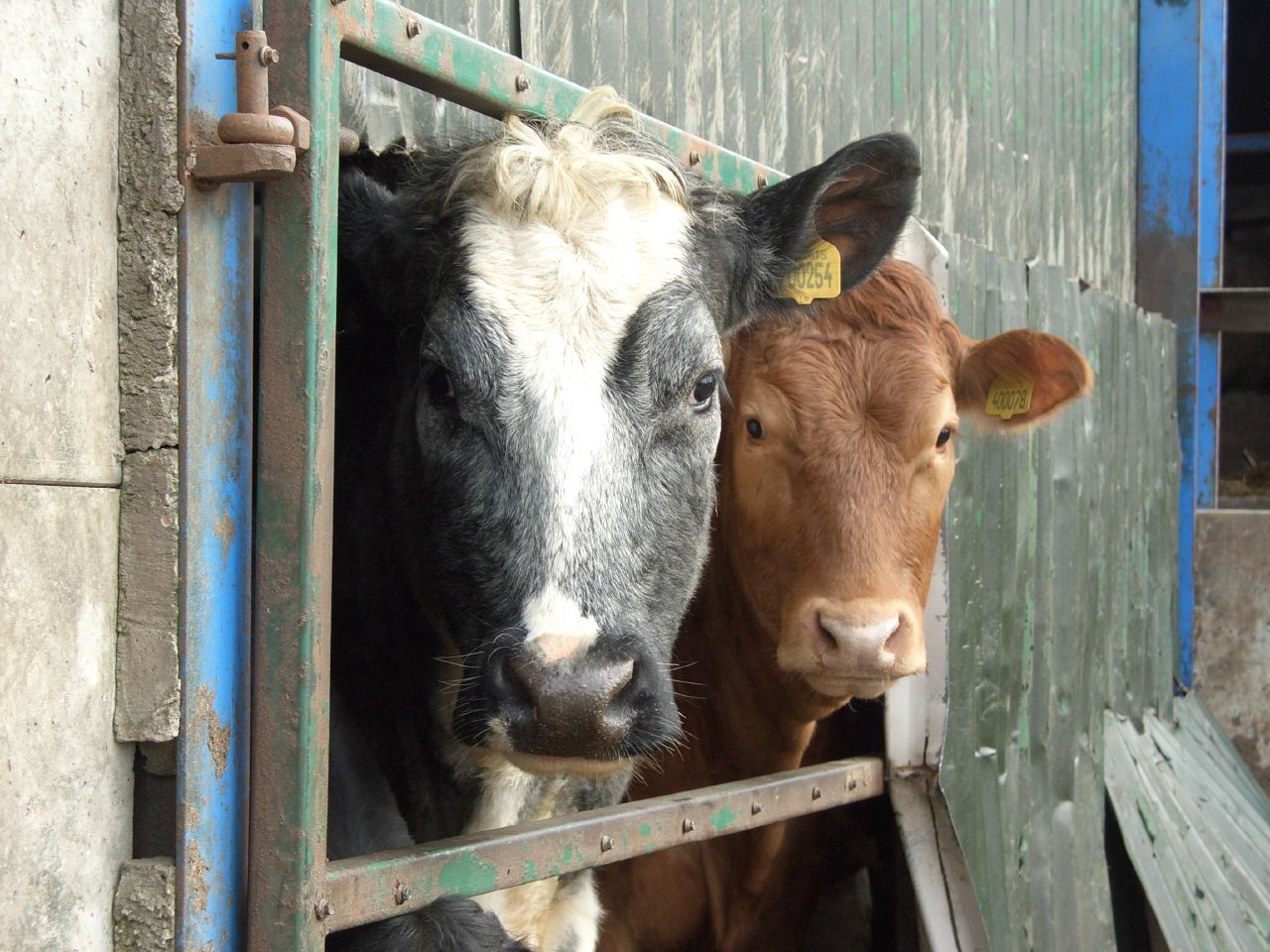 Die Markierung ist in beiden Ohren zu befestigen. Wohl bekomm's. Тоҷикӣ: Гов ало ва зард.